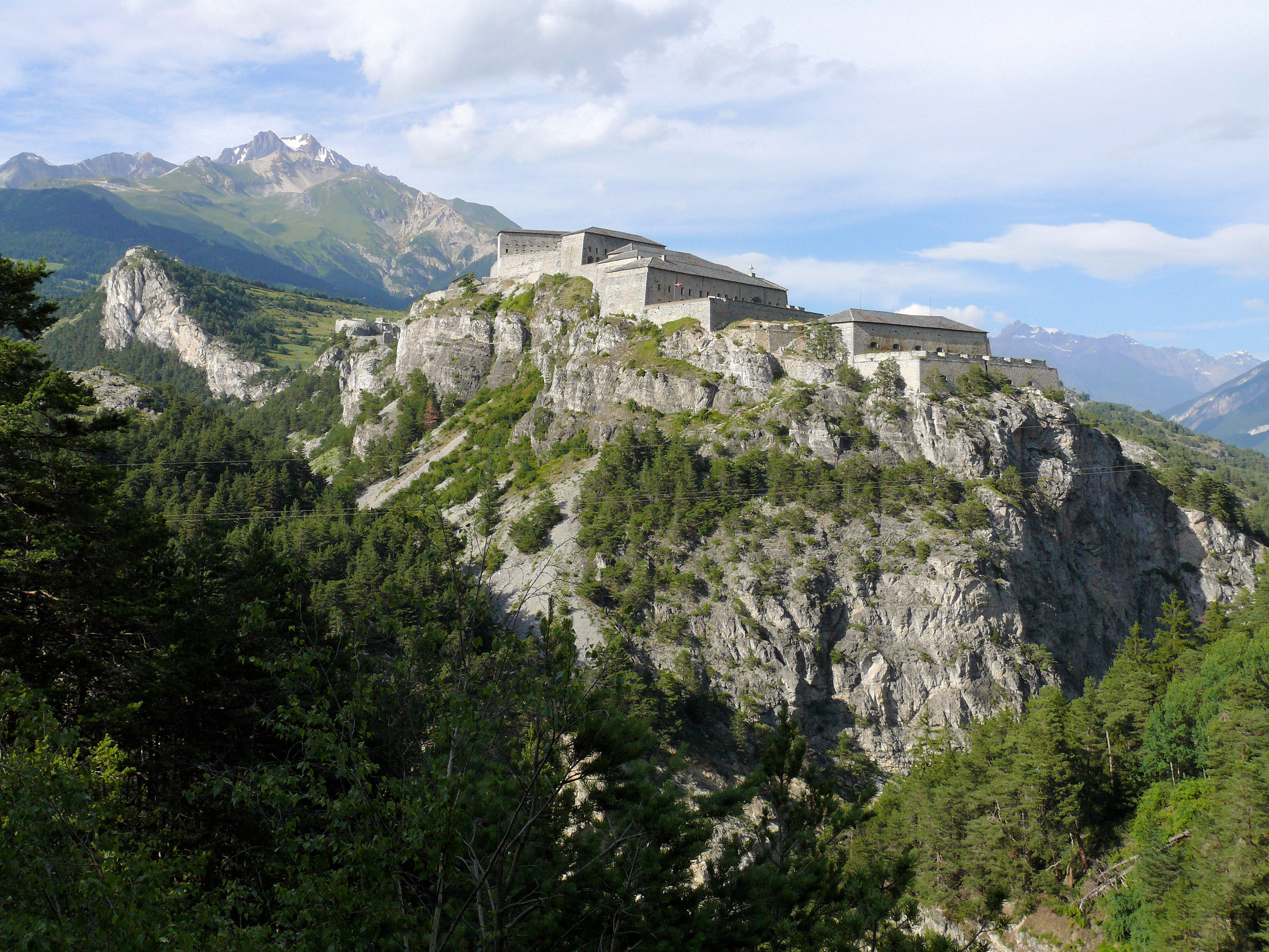 Aussois - Forts de l'Esseillon - Fort Victor-Emmanuel, fort Charles-Félix et fort Marie-Christine